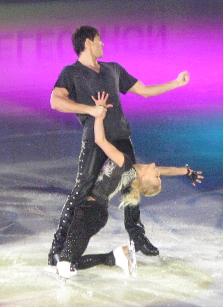 Tatiana Volosozhar et Maxim Trankov au gala des Championnats du monde de patinage artistique 2012 à Nice.